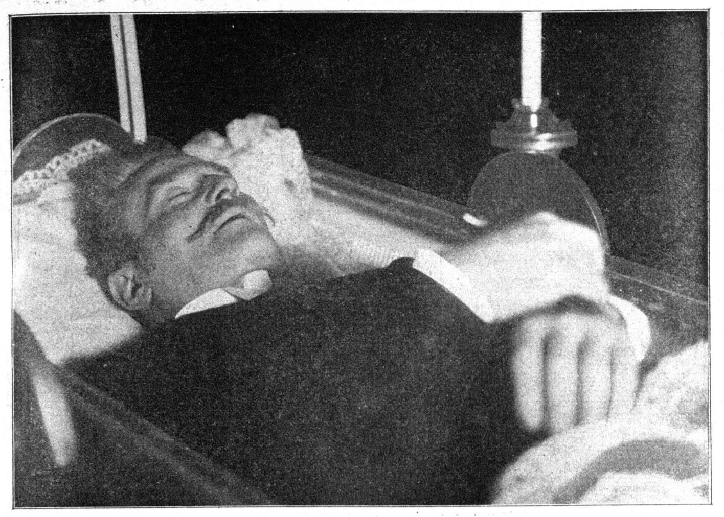 Leiche von Max Burckhard